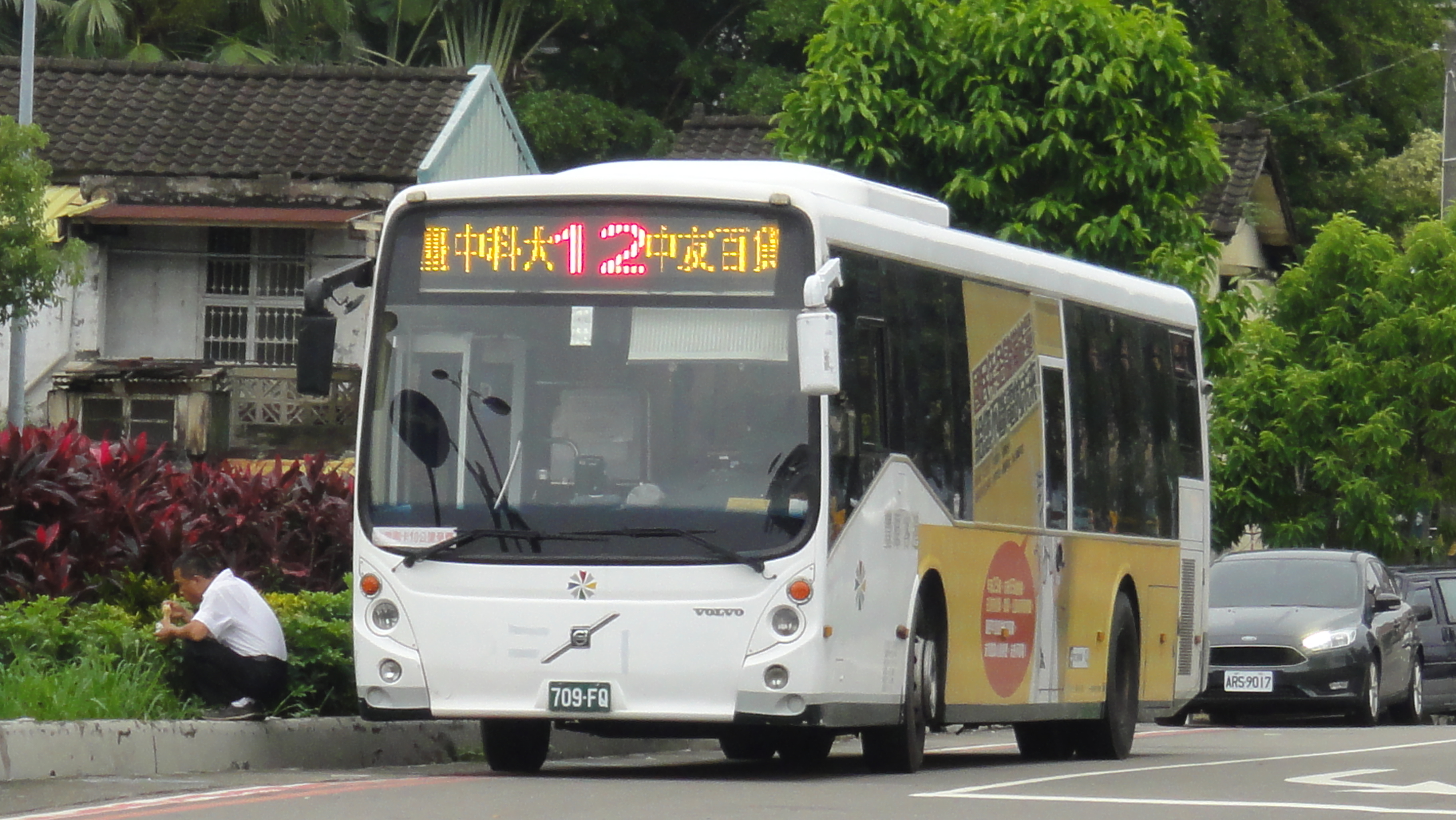 豐原客運Volvo B7RLE大客車709-FQ行駛台中市公車12路